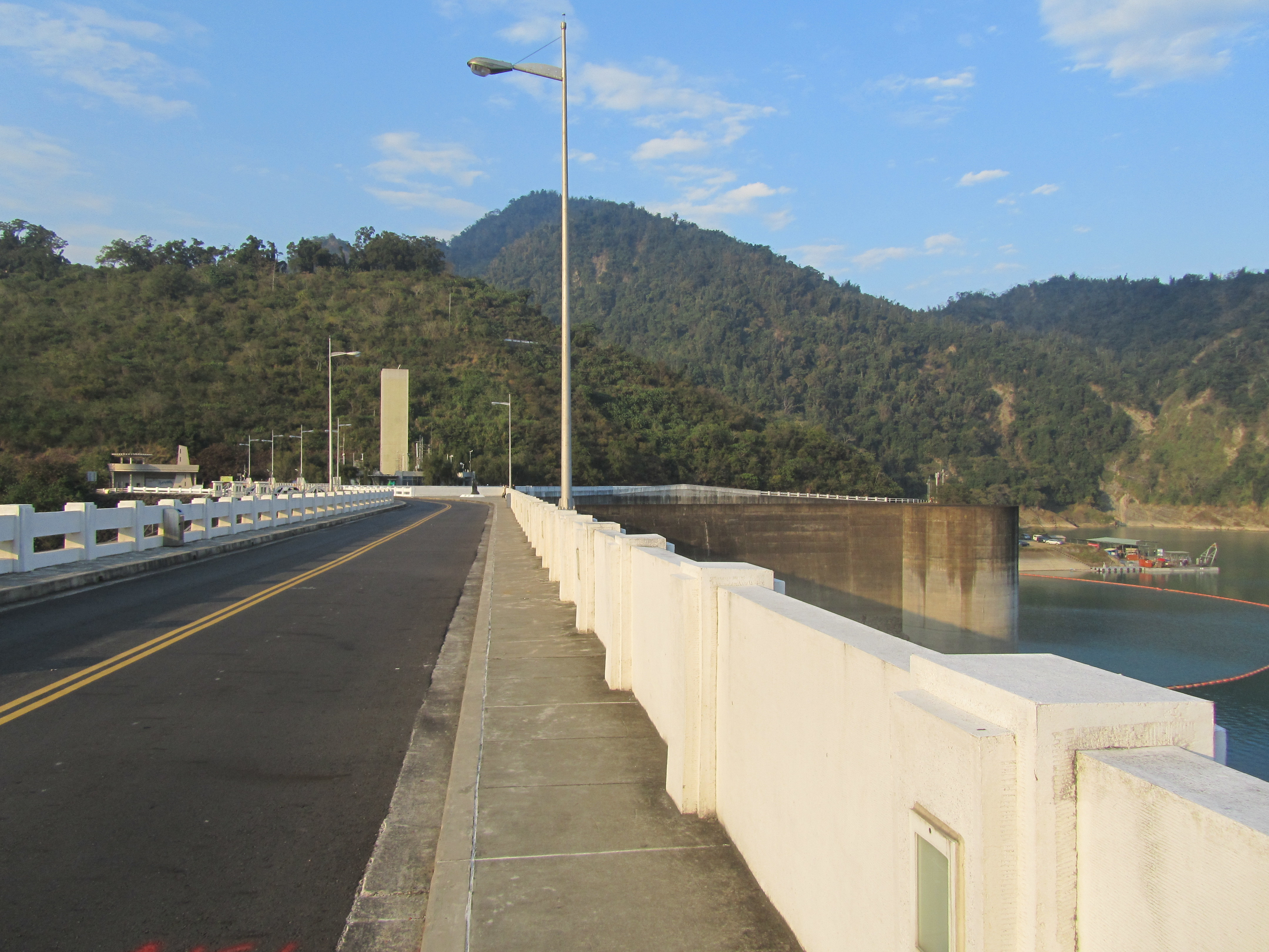 2012年1月30日，曾文水庫壩上道路，被編為嘉145-1鄉道；遠處為大壩紀念碑。